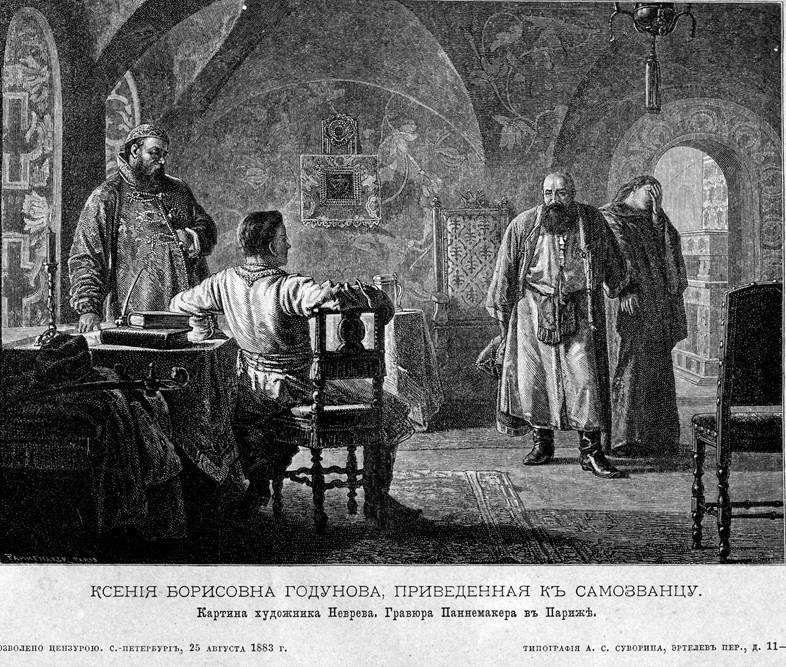 Ksenia Godunova taken to False Dmitriy